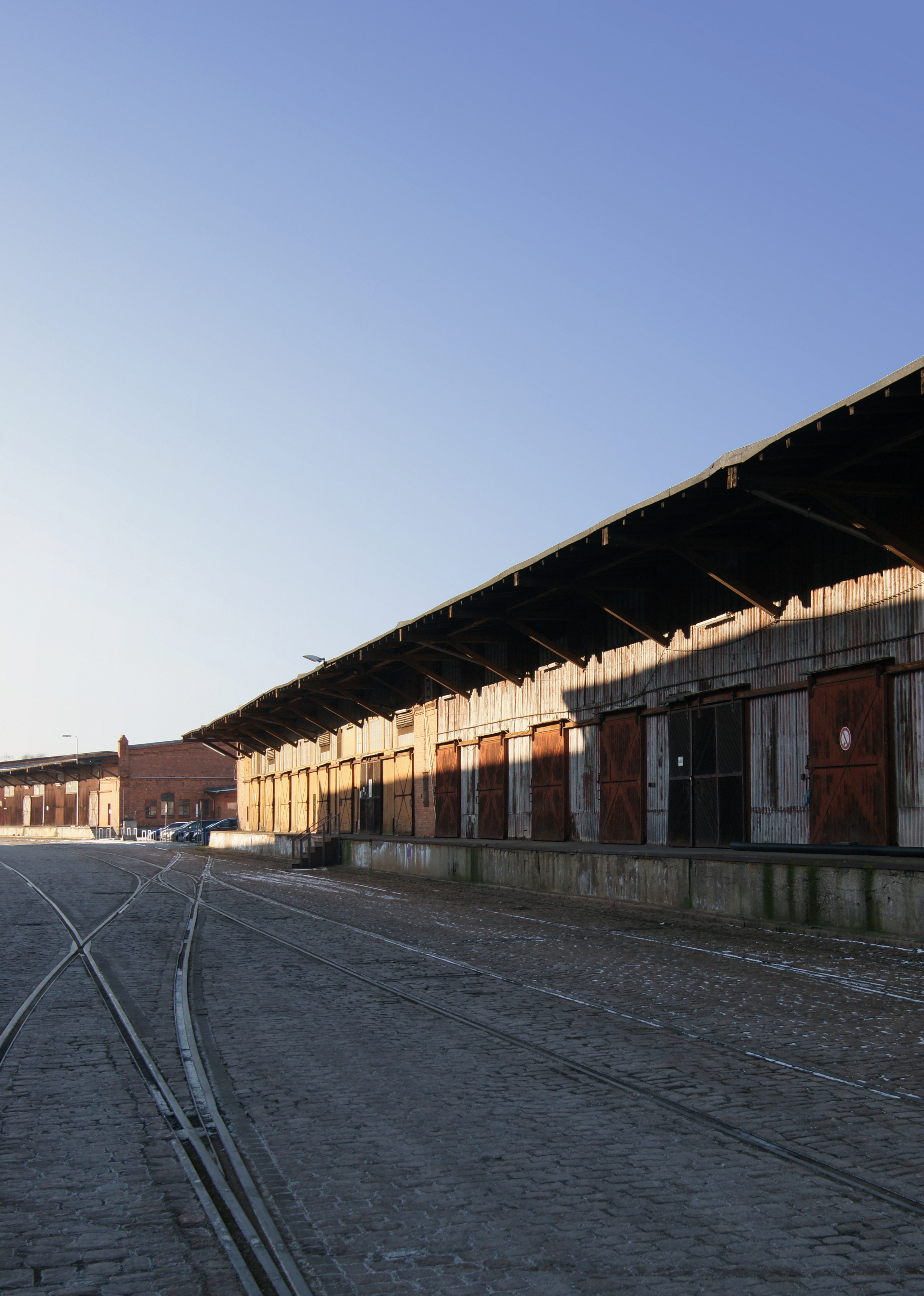 Lübeck, Nördliche Wallhalbinsel, Ansicht von Schuppen B (vorne) und A (hinten)